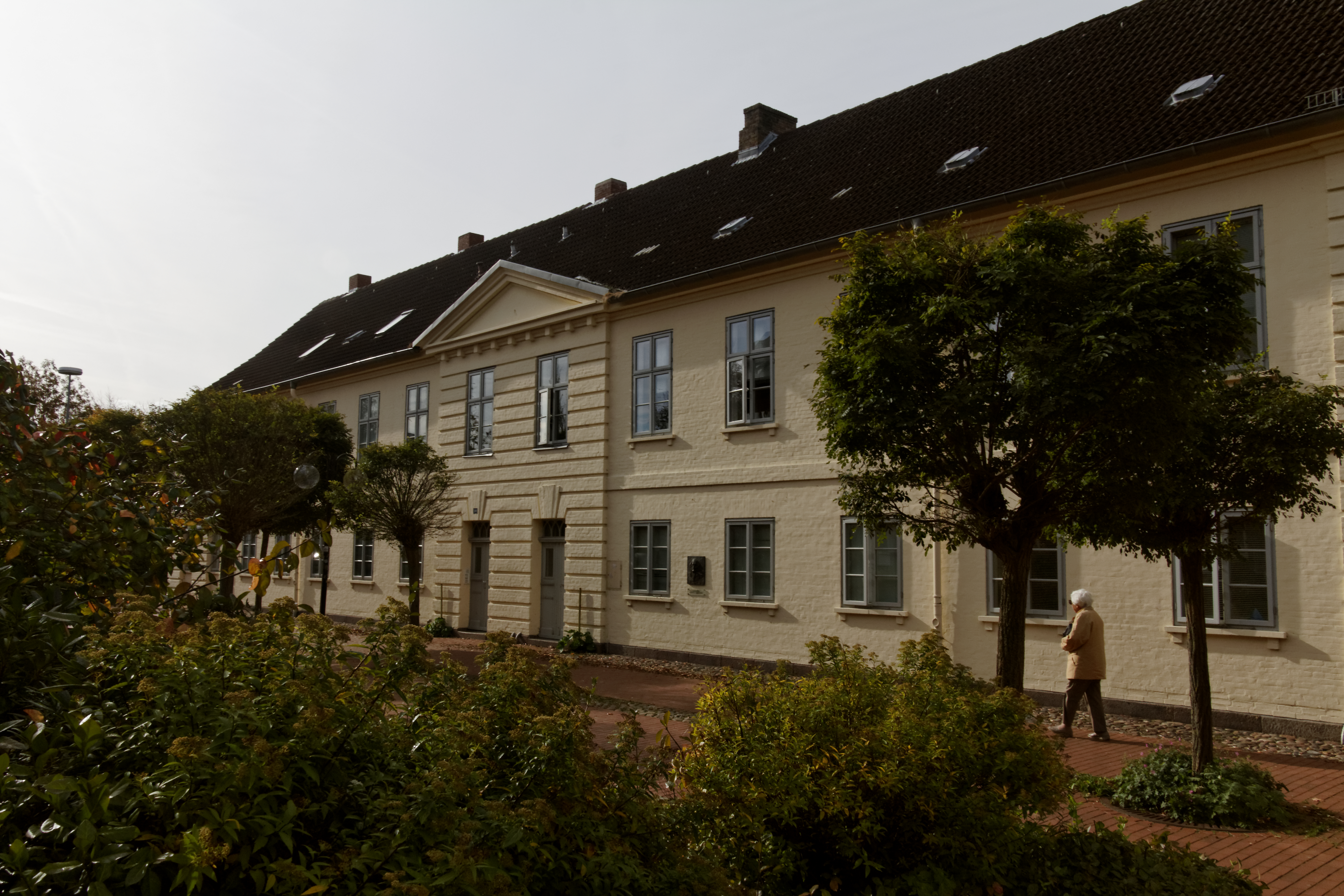 Eckernförde, Kieler Str. 98-100 Wohnhaus, ehemaliges Christianpflegehaus This is a photograph of an architectural monument. It is on the list of cultural monuments of Eckernförde